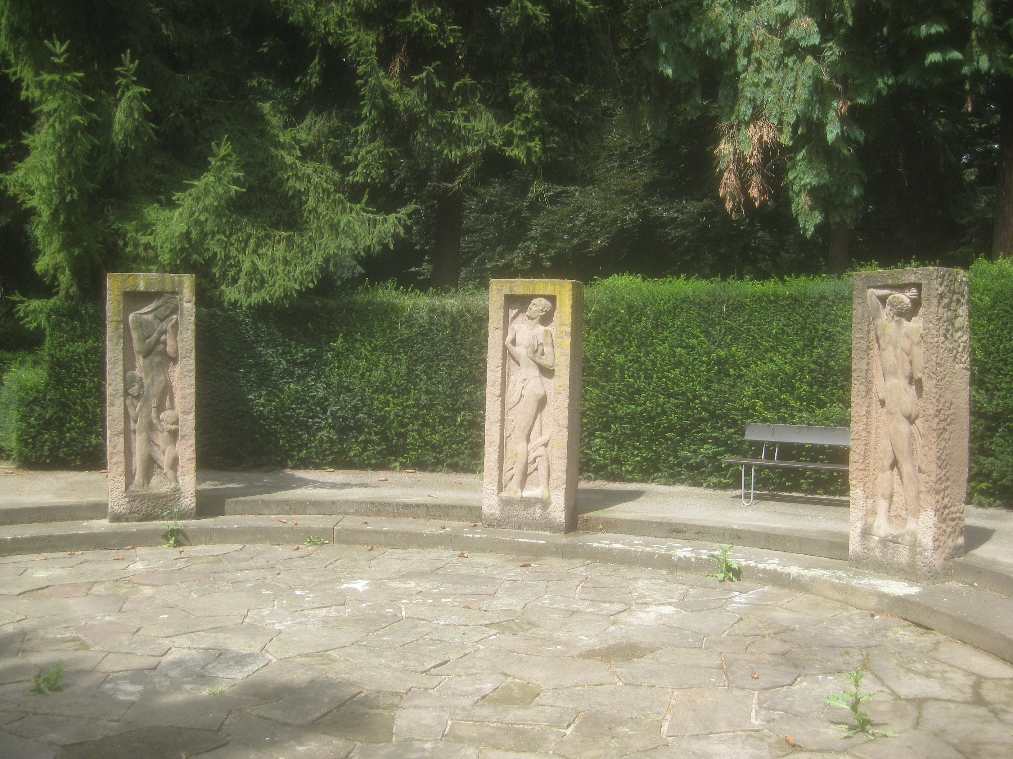 Alter Friedhof (Ludwigsburg), Kriegerehrenmal 1914/18, 5.-7. Stele rechts vom Erzengel Michael.